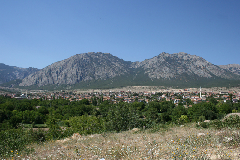 Kargı'nın esentepeden görünümü